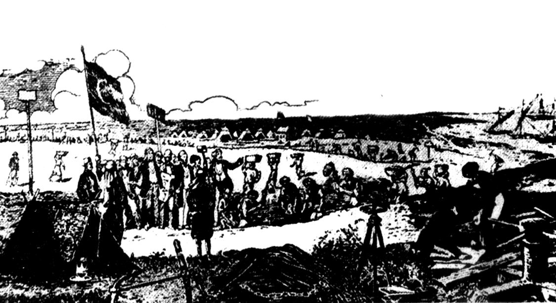 المعول الأول في حفر قناة السويس